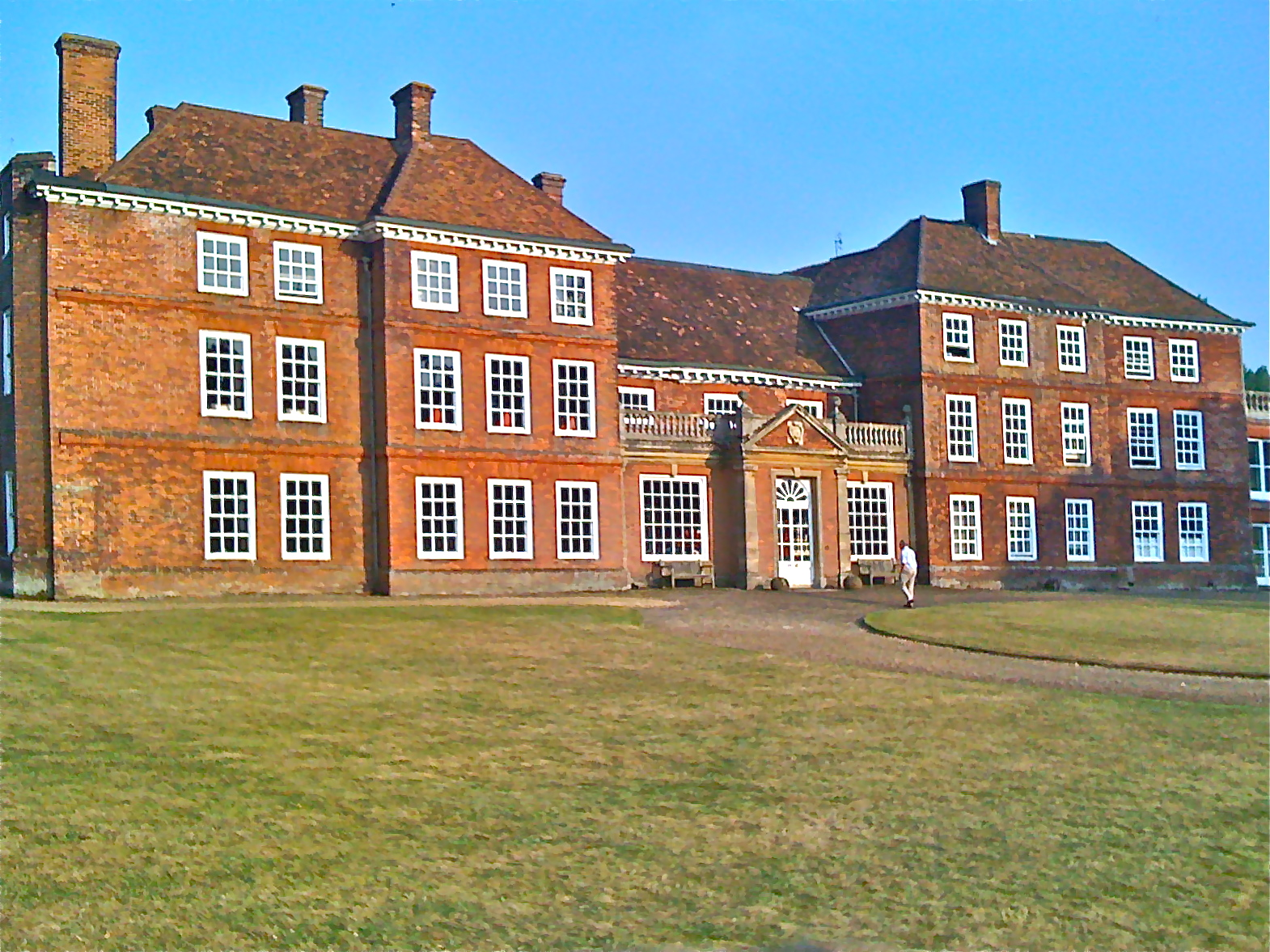 Lullingstone Manor-Eynsford,Kent